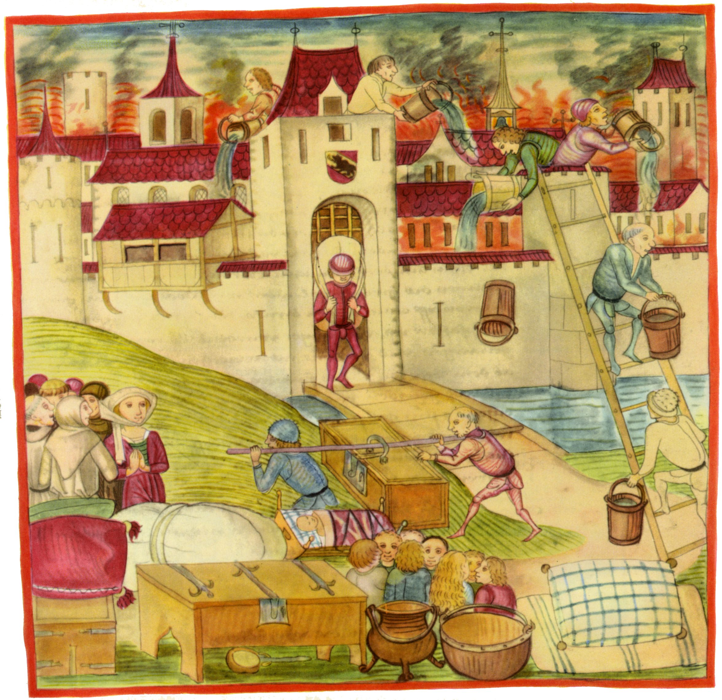 Der grosse Brand von Bern 1405. Amtliche Berner Chronik des Diebold Schilling, Bd. 1, 144, 1478.